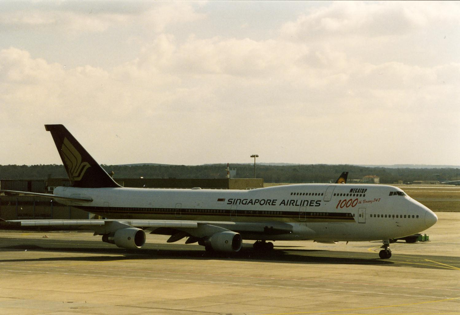 Boeing 747-400 Singapore Airlines 9V-SMU